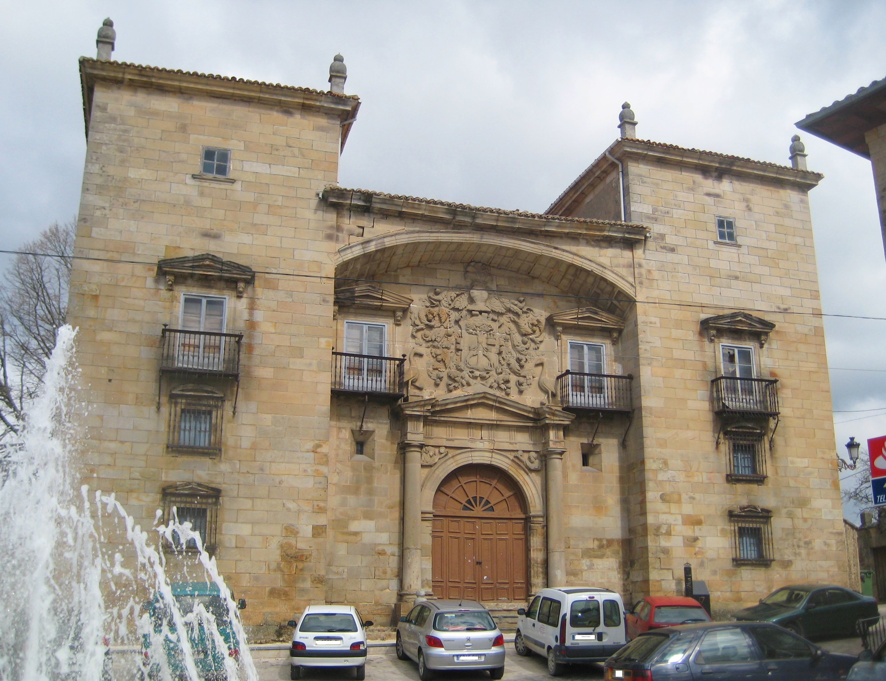 Palacio de Chiloeches en Espinosa de los Monteros, Burgos, España